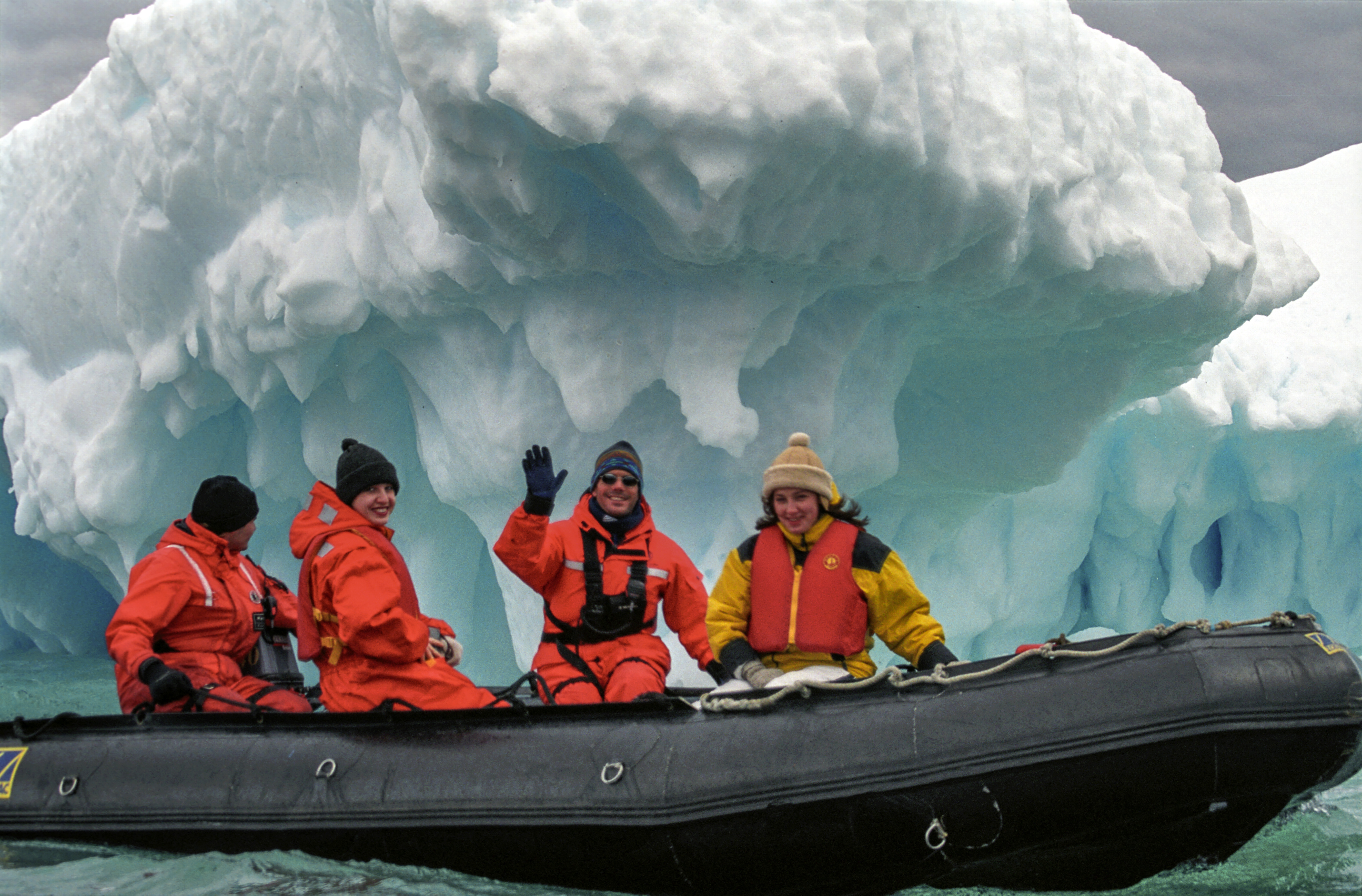 Antarctic